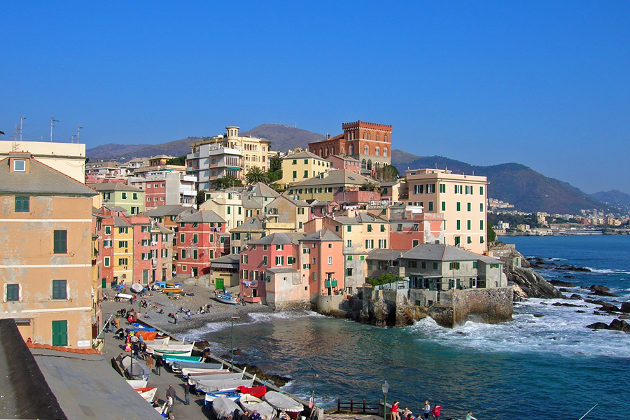 Veduta di Boccadasse, Genova